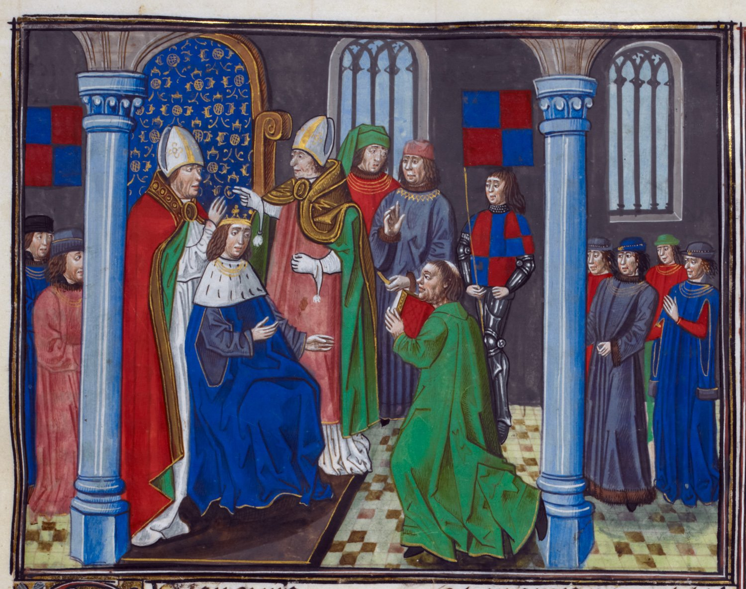 F404-Coronnement de Henri IV